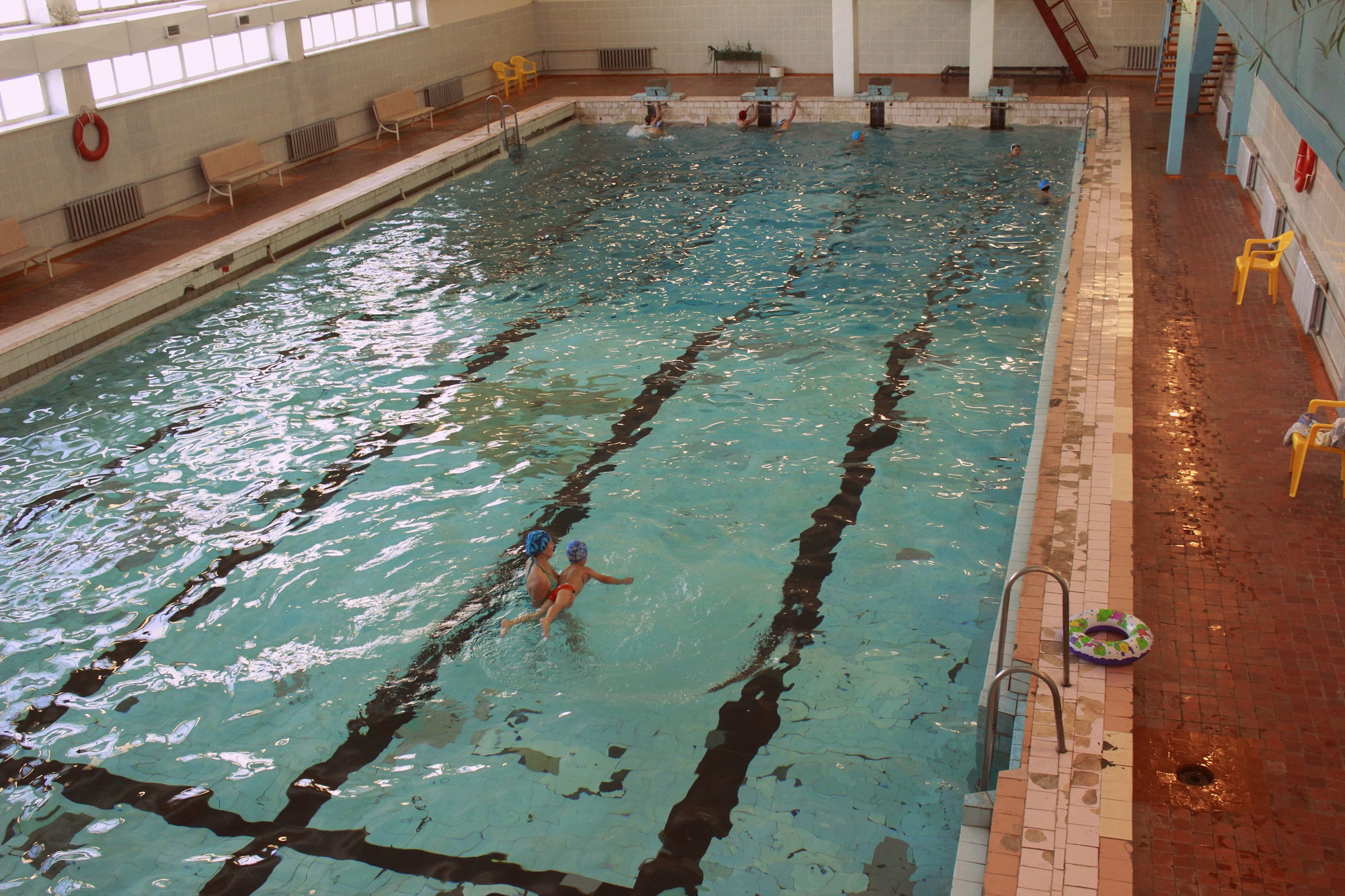 Бассейн в селе Новая Брянь. Заиграевский район, Бурятия, Сибирь